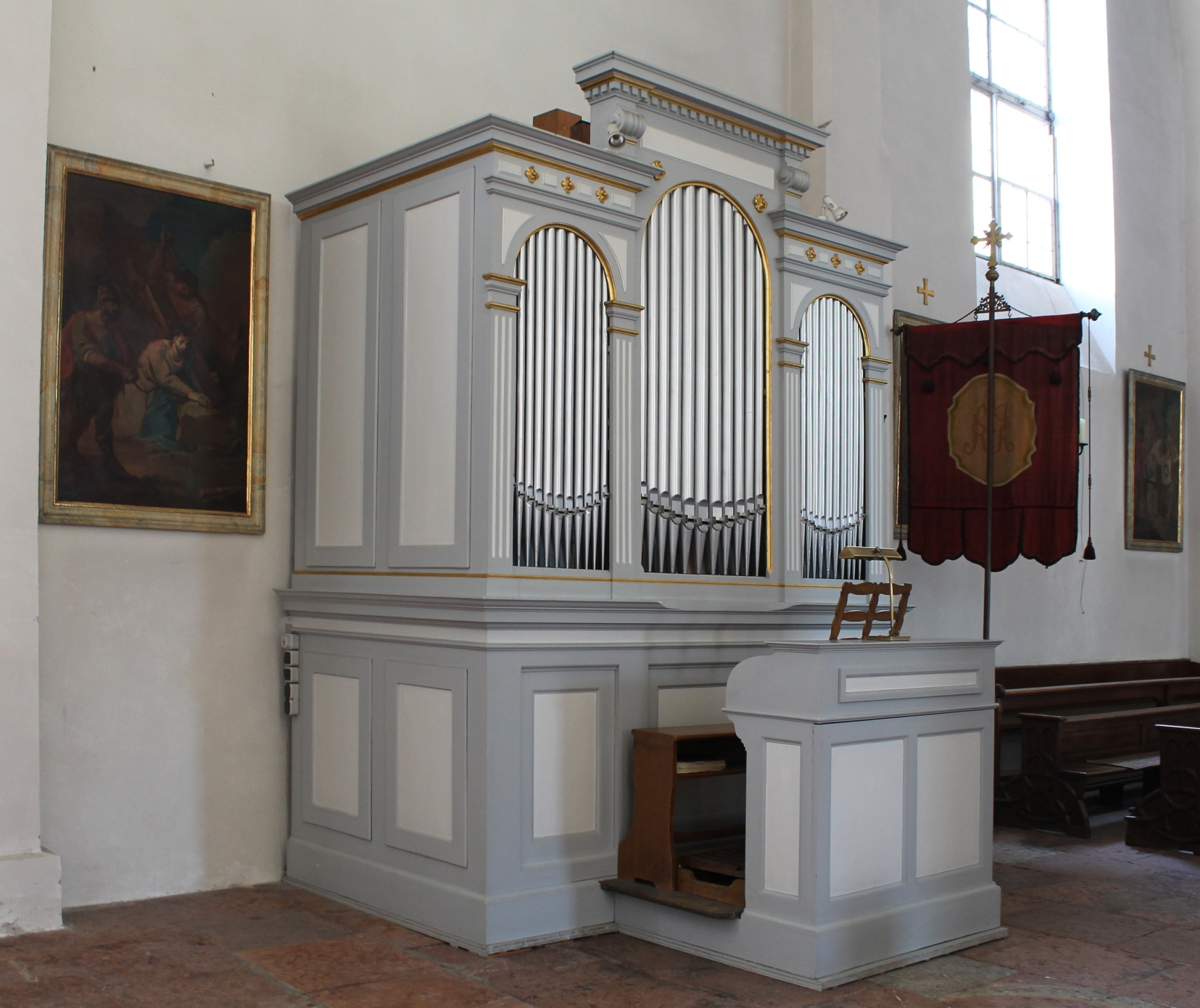 Augustinus-Orgel von St. Zeno in Bad Reichenhall (1890, F.B.Maerz op. 233, I/9)